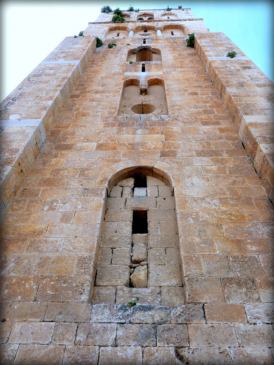 המגדל העתיק ברמלה